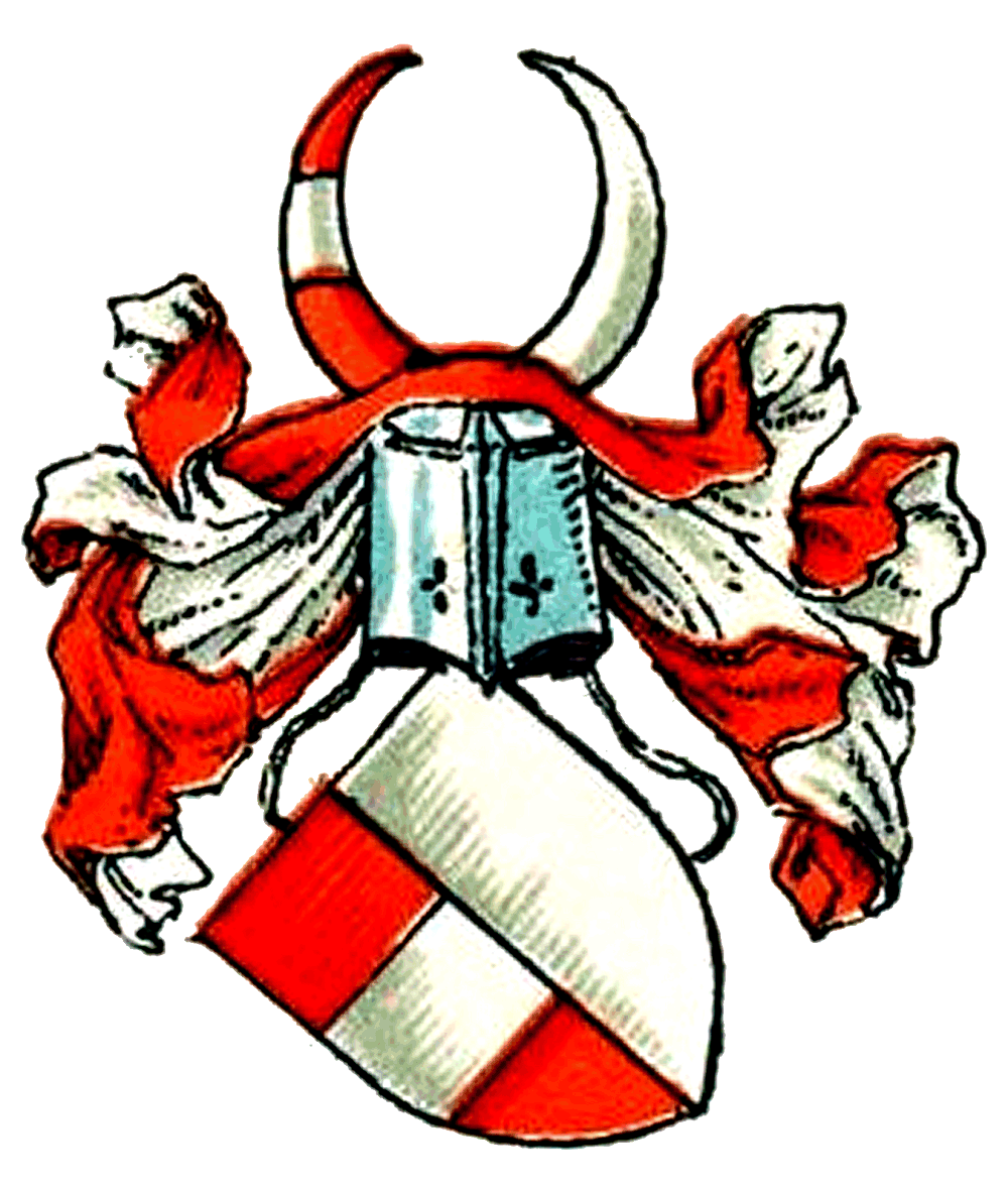 Stammwappen derer von Pelckhofen